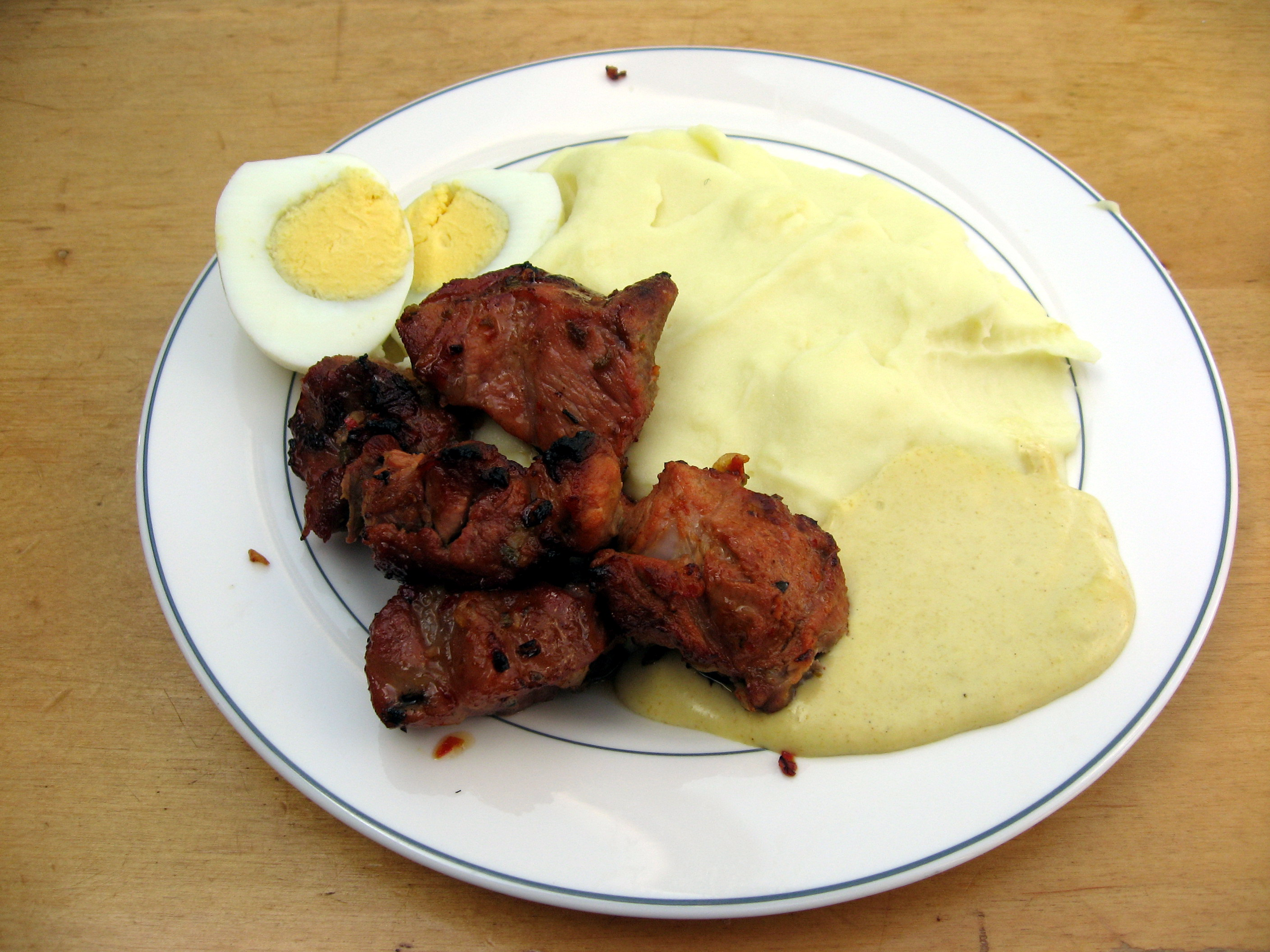 Maso ze špízu, bramborová kaše, vajíčko na tvrdo, hořtice